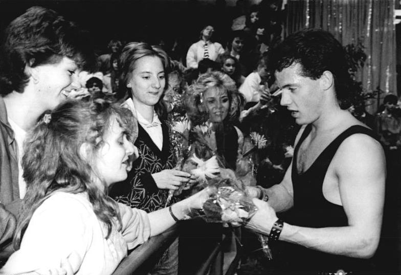 Kurt Browning ADN-ZB Settnik 7.4.89 Berlin: ISU-Weltschaulaufen in der Werner-Seelenbinder-Halle (am 6.4.89)- Nach seiner mit Begeisterung der 4000 Zuschauer aufgenommenen Interpretation gekonnter und origineller Rock-Parodien wurde Weltmeister Kurt Browning (Kanada) herzlich gefeiert.